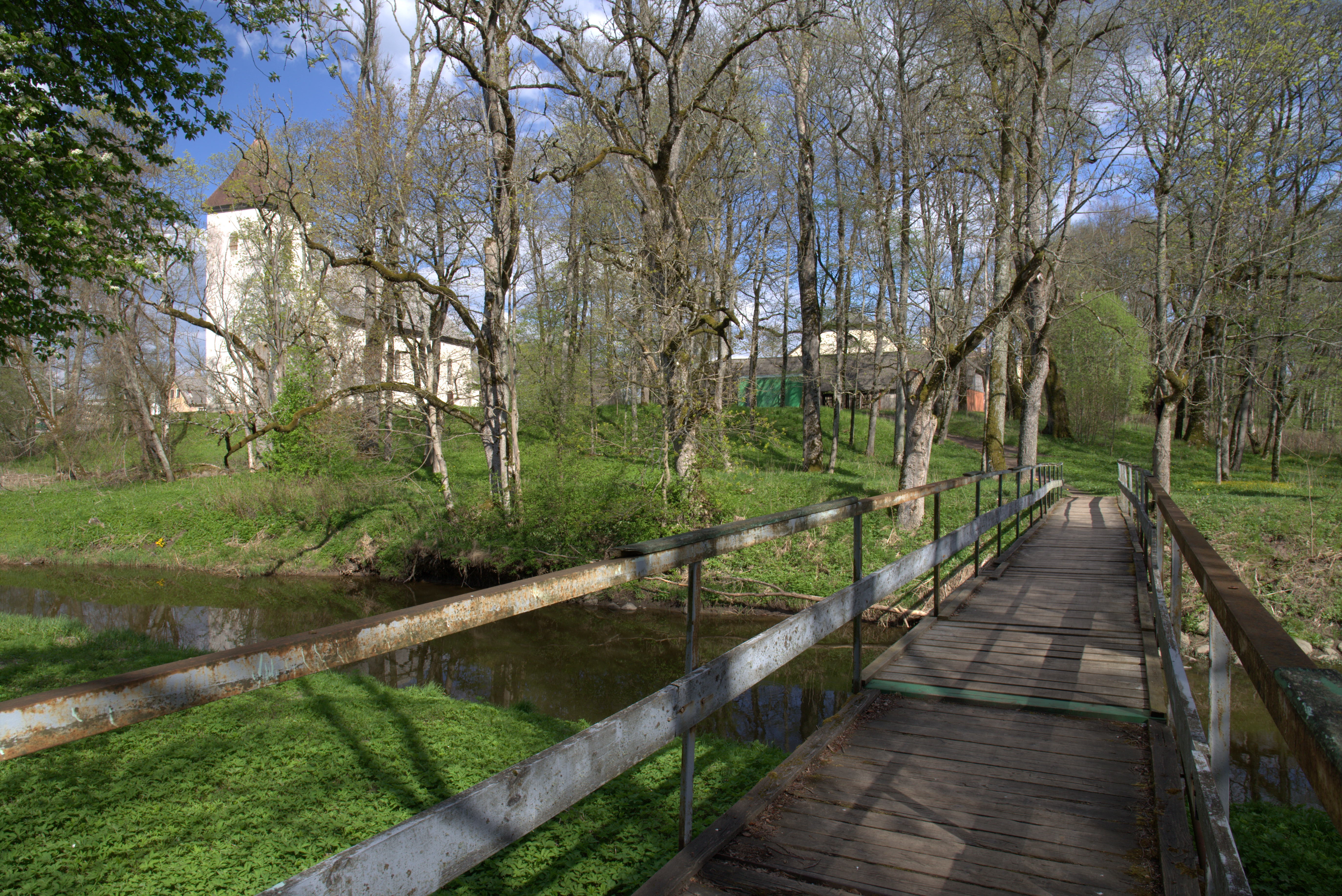 Cīravas baznīca / church